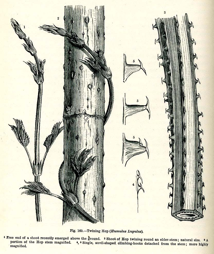 Twining Hop (Humulus lupulus). Recently emerged stem from the ground and detail of climbing hooks (very distinctive epidermal hairs or trichomes, that act as grappling hooks, securing their grip on supporting structures).